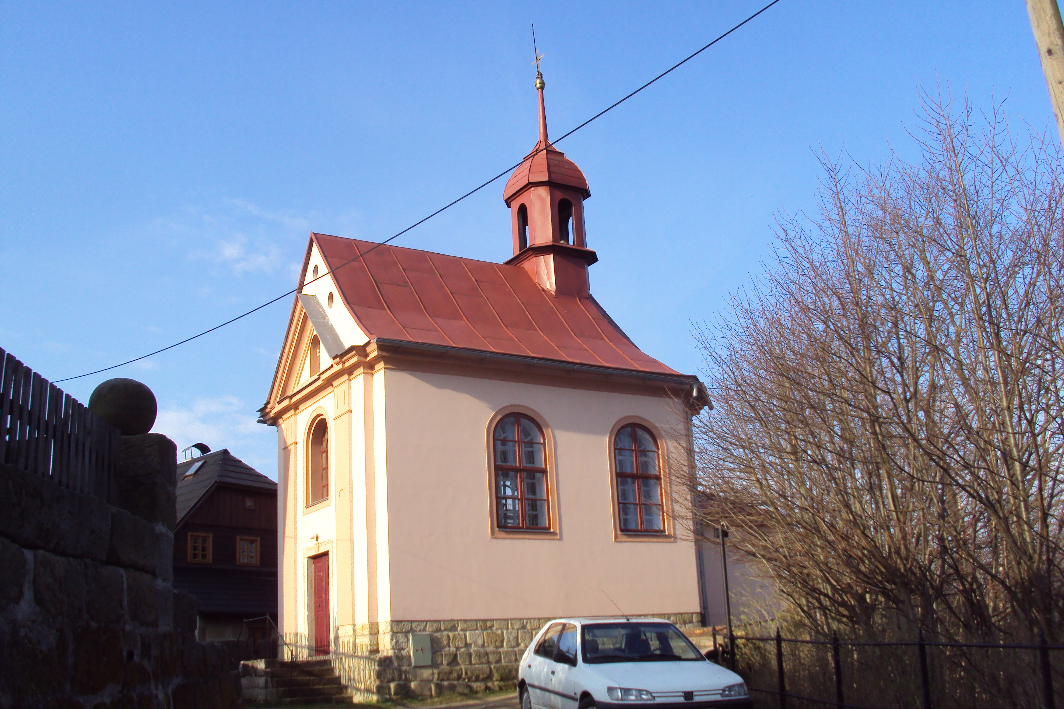 Kaple sv.Ant.Paduánského v Radvanci na Českolipsku